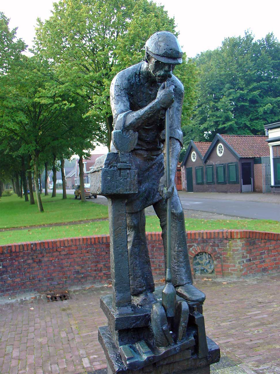 De glasblazer Noorderdiep te Nieuw Buinen door Onno de Ruijter (1974)